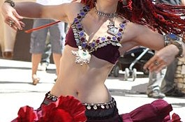 Cintura de una mujer